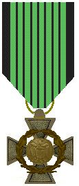 Franse onderscheiding voor vrijwilligers aan het Oostfront